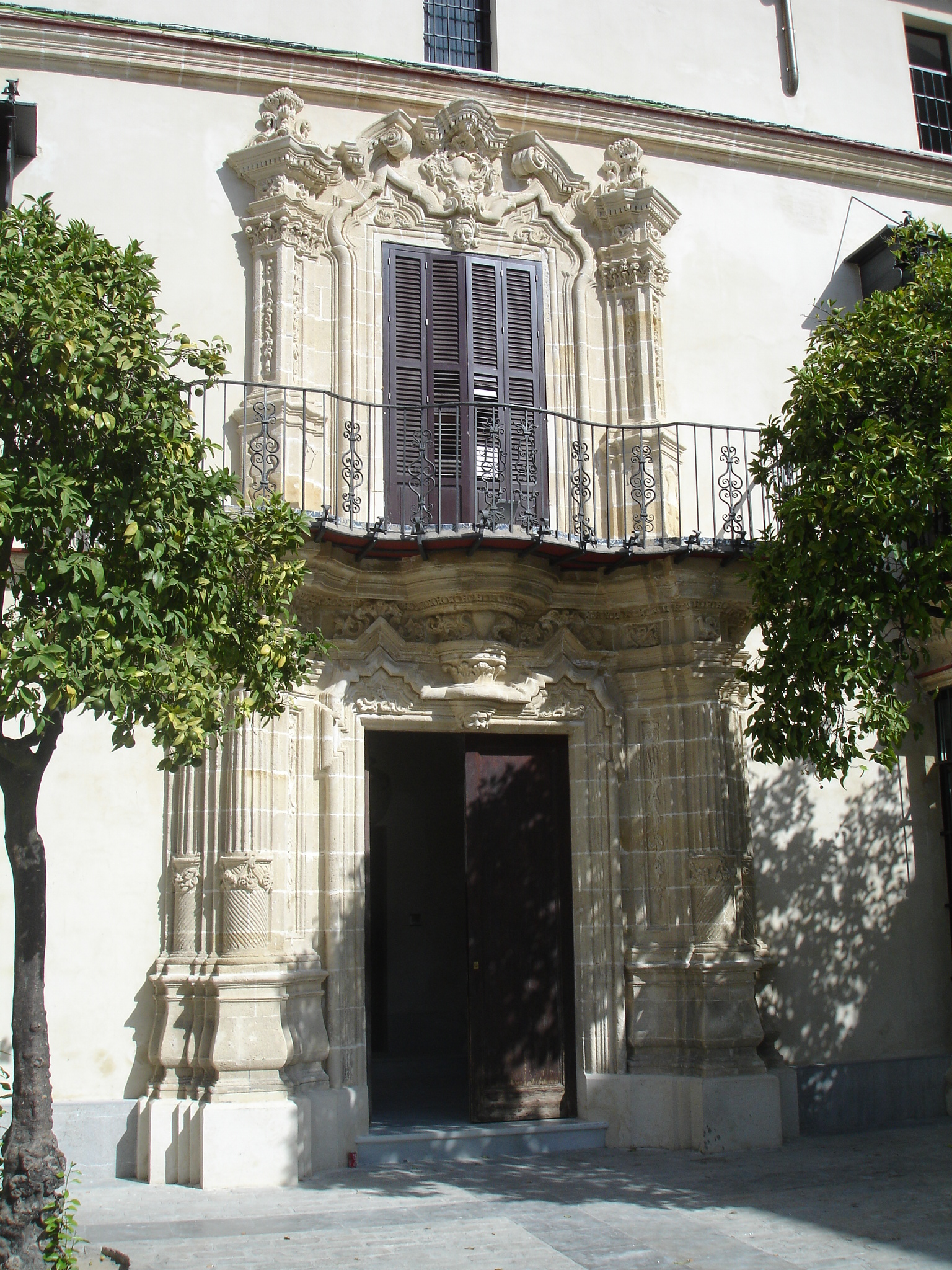 Palacio de Luna. Jerez de la Frontera (Andalusia, Spain)